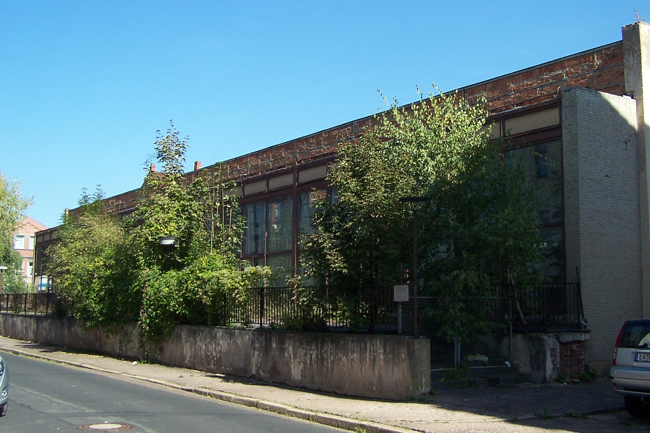 Die seit 20 Jahren ungenutzte, inzwischen zur Ruine verfallene ehemalige FER-Betriebskantine in der Adelheidstraße.